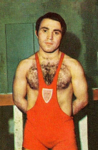 CAMPIONI dello SPORT 1970/71-n.46- BOGNANNI - LOTTA